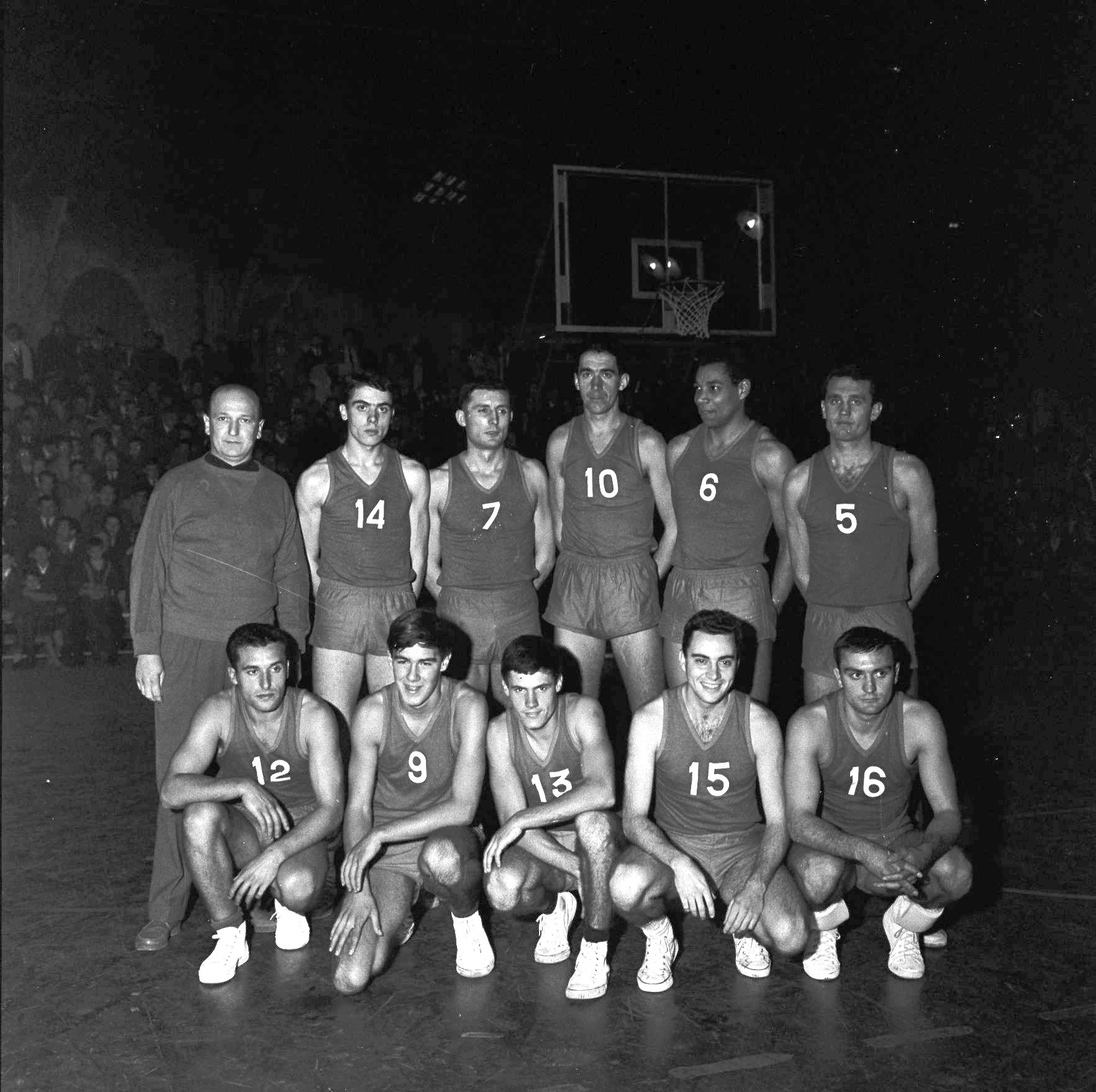 Gymnase municipal le Pré-Catelan (allées Jean-Jaurès). 29 octobre 1961. Photo de groupe de l'équipe de basket du Racing Club Municipal de Toulouse ; en arrière-plan panier de basket et gradins avec spectateurs. Observation: A l'origine salle de music-hall, le Pré-Catelan devient un gymnase municipal. Il abrite au rez-de-chausseé le Racing Club Municipal de basket et, à partir de 1959, le 1er étage est occupé par la section escrime du TUC. Il est détruit en 1976.